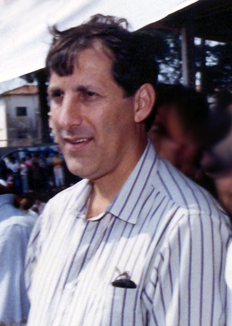 Orestes Quércia, ex-governador de São Paulo, em Avaré, década de 80